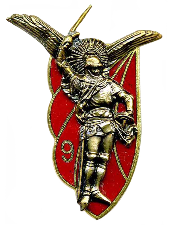 Insigne du 9e régiment de chasseurs parachutistes